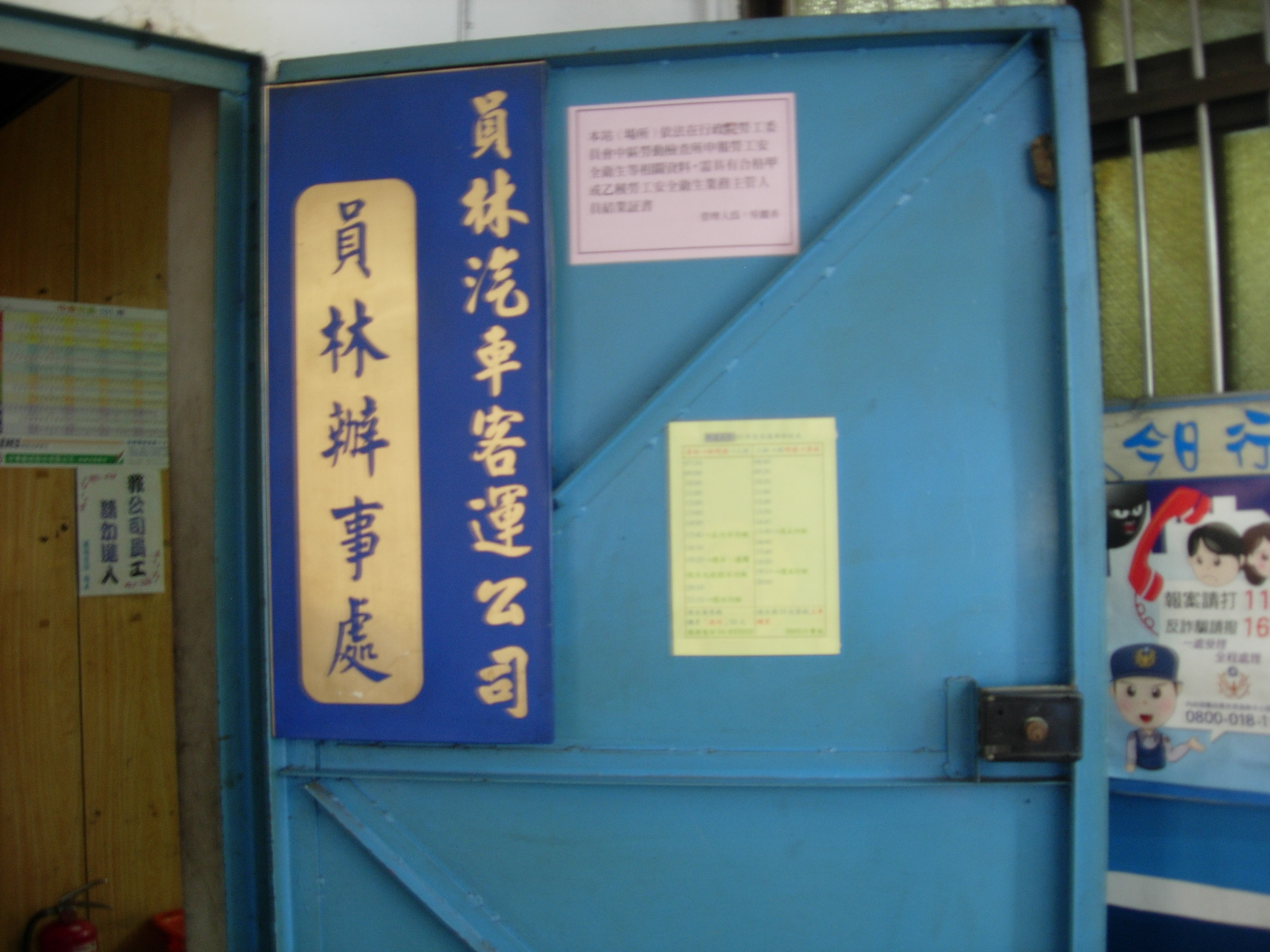 中文（台灣）: 員林客運員林辦事處看板